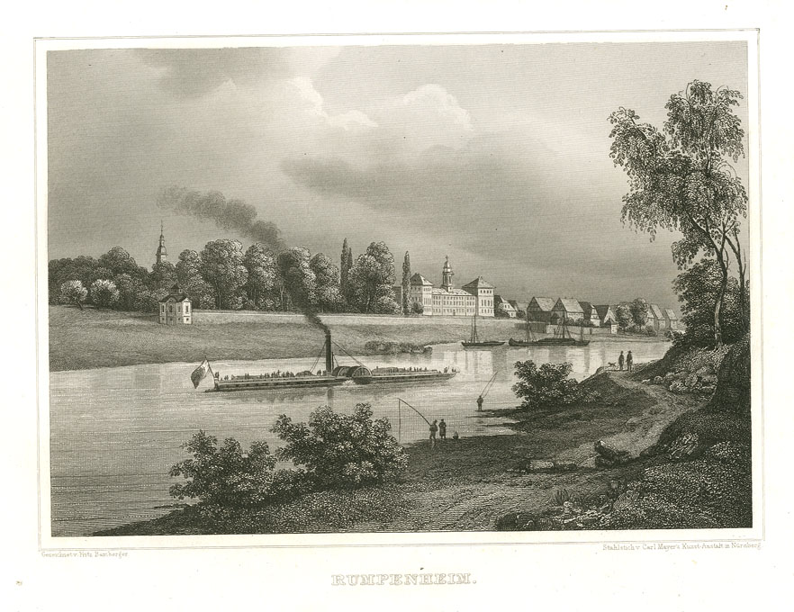 Rumpenheim. Stahlstich nach Vorzeichnung von Fritz Bamberger, 1847, aus: Ludwig Braunfels; Die Mainufer und ihre nächsten Umgebungen. Verlag Carl Etlinger, Würzburg 1847. Gedruckt in der Kunstanstalt von Carl Mayer, Nürnberg.